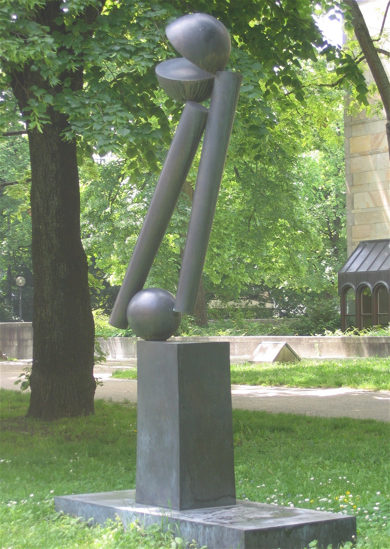 Fritz Koenig: Große zwei V, 1973, Bronzeguss, vor der Neuen Pinakothek in München